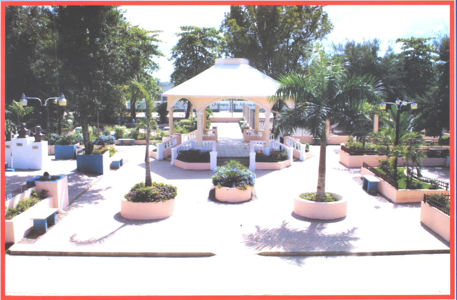 Vista frontal del parque central de San Antonio de Guerra.